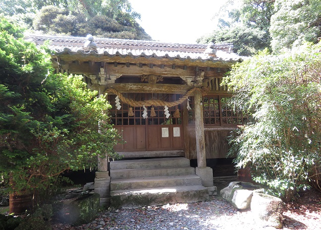 多久頭魂神社（長崎県対馬市厳原町豆酘）